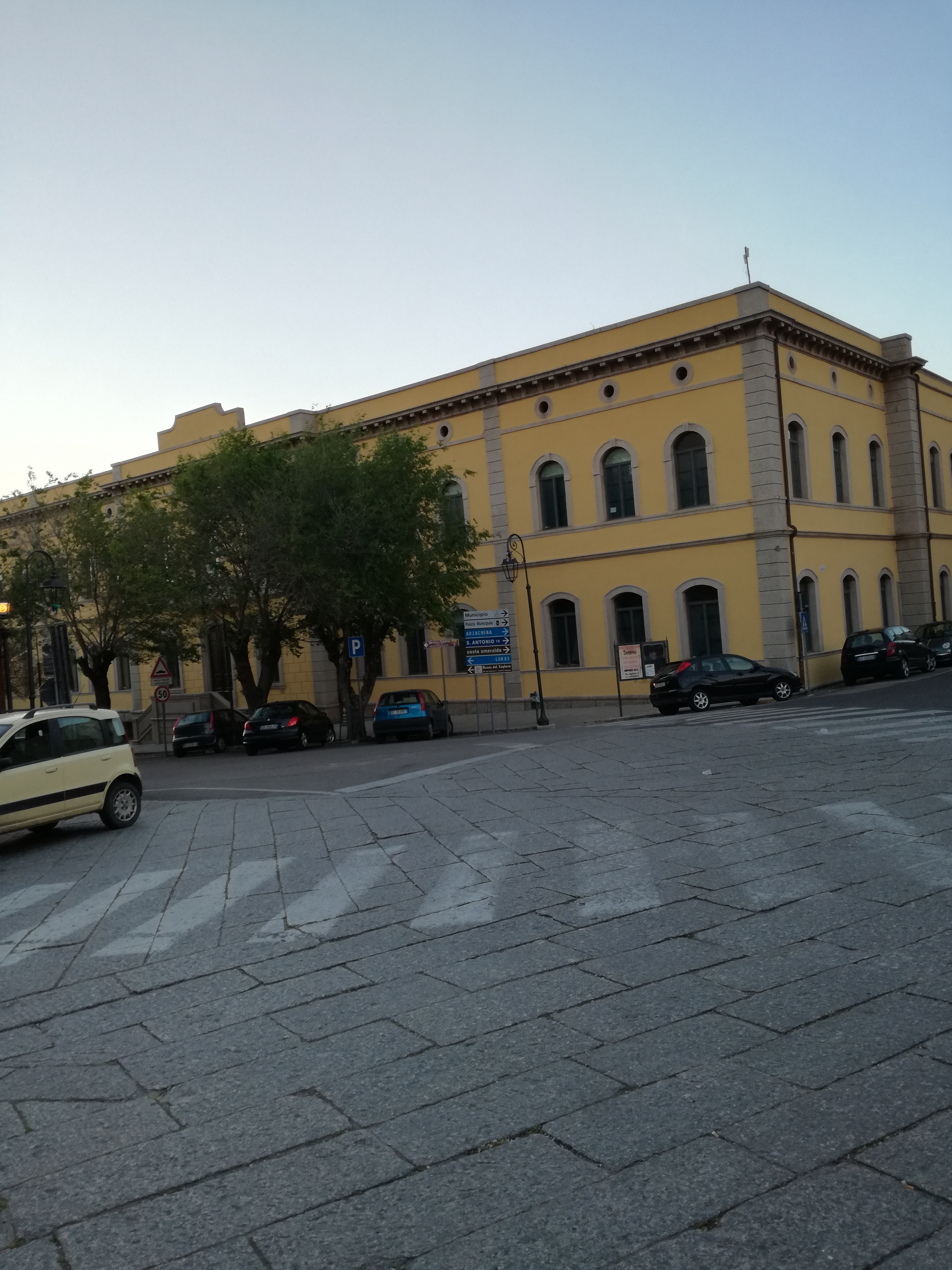 Il caseggiato delle scuole elementari di Calangianus.